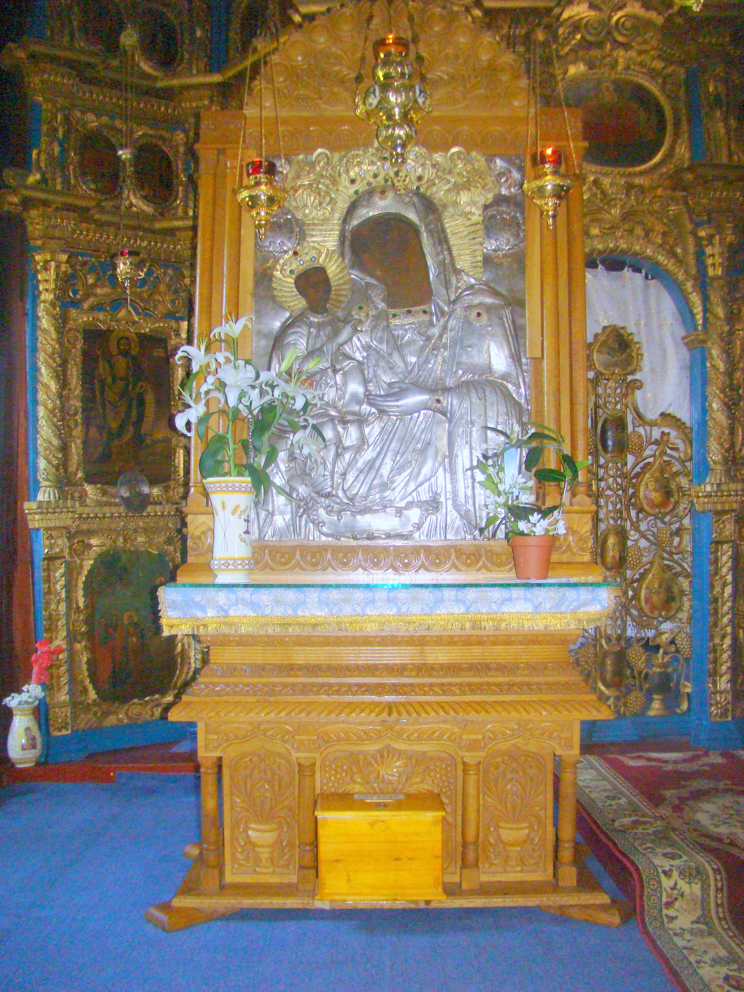 Mănăstirea Dălhăuți, Vrancea